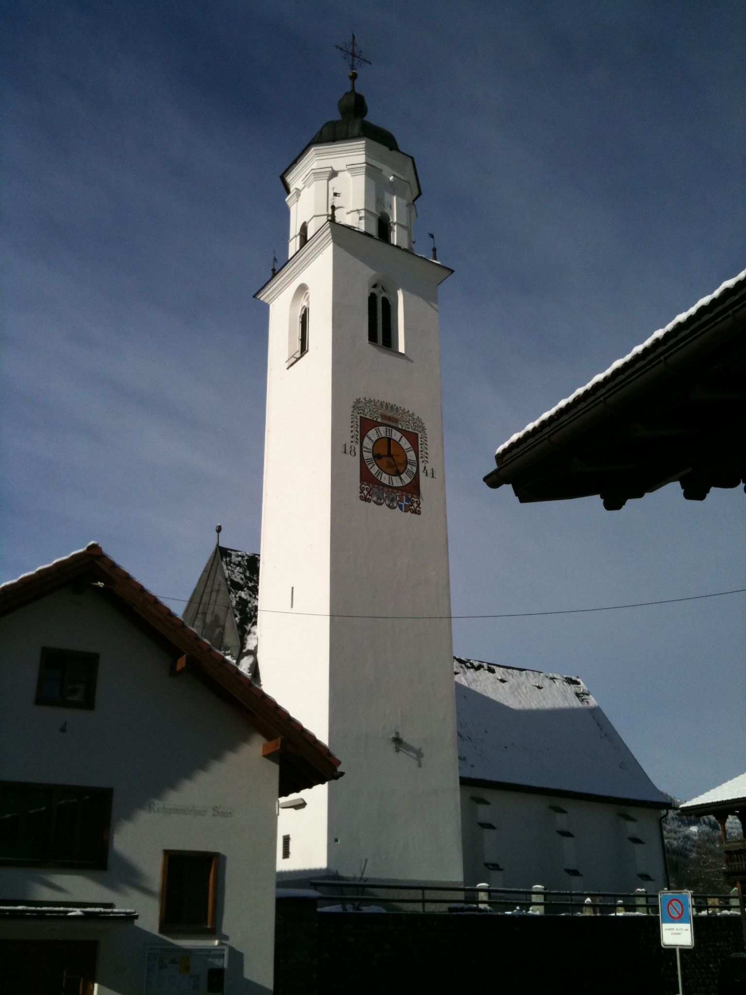 Kirchturm in Saas im Prättigau, Kanton Graubünden